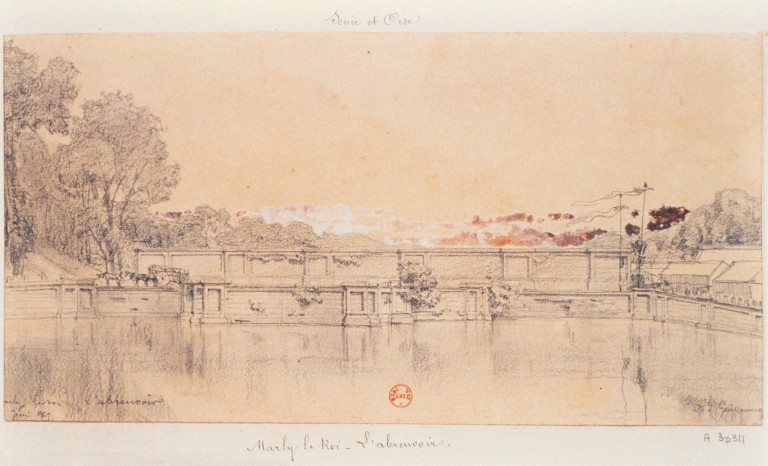 Marly-le-roi. L'abreuvoir, dessin de Guillaumot, Auguste Alexandre (1815-1892)